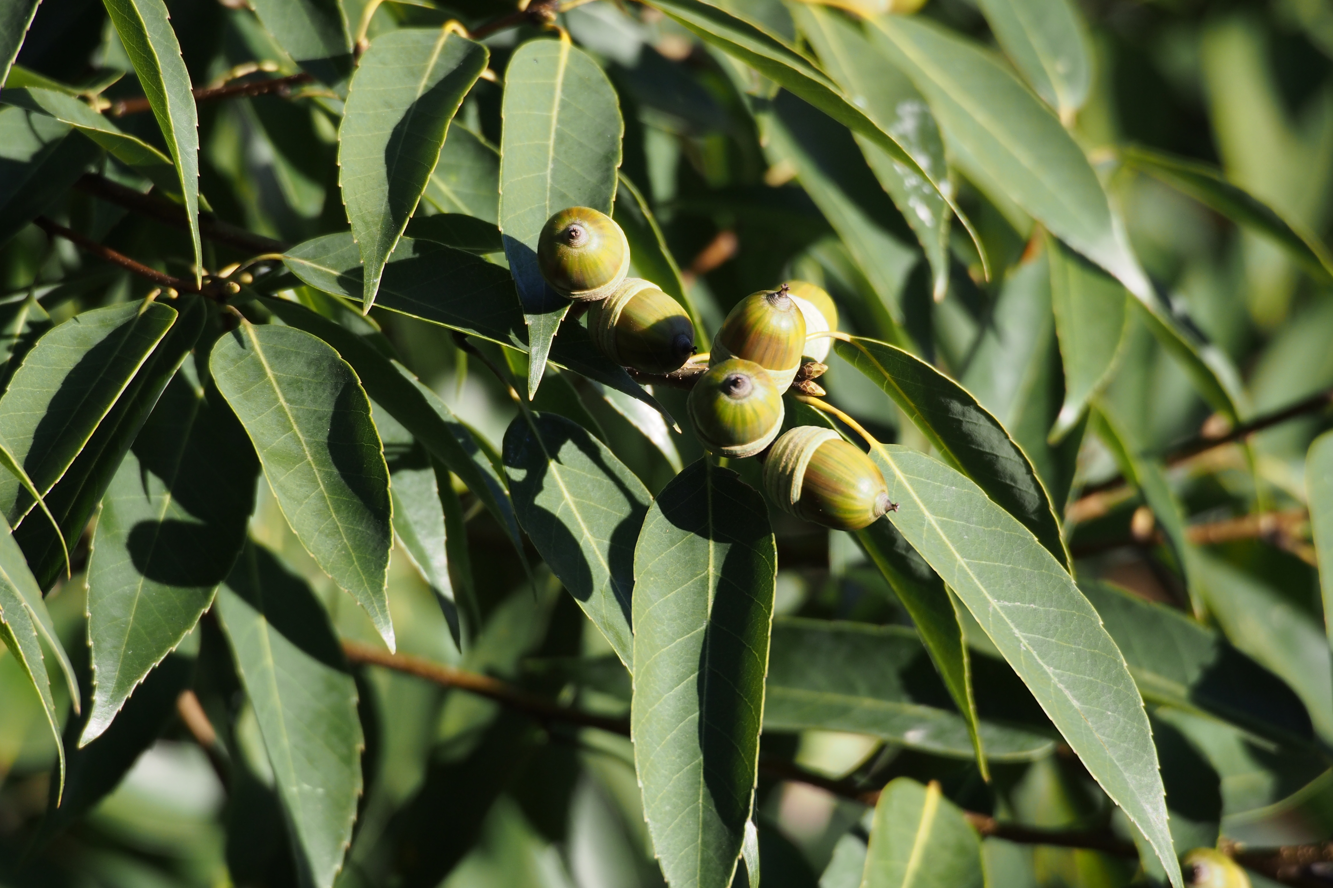 シラカシ.